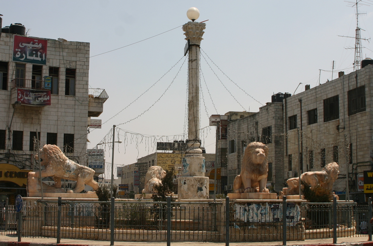 Der Al-Manara-Platz in Ramallah, Palästina. Object location 31° 54′ 18.0″ N, 35° 12′ 16.0″ E This and other images at their locations on: Google Maps - Google Earth - OpenStreetMap - Proximityrama(Info)